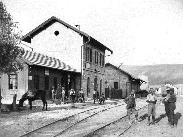 תחנת הרכבת בצמח בשנת 1918